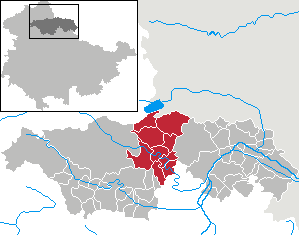 Verwaltungsgemeinschaft Kyffhäuser in Thuringia - Kyffhäuserkreis